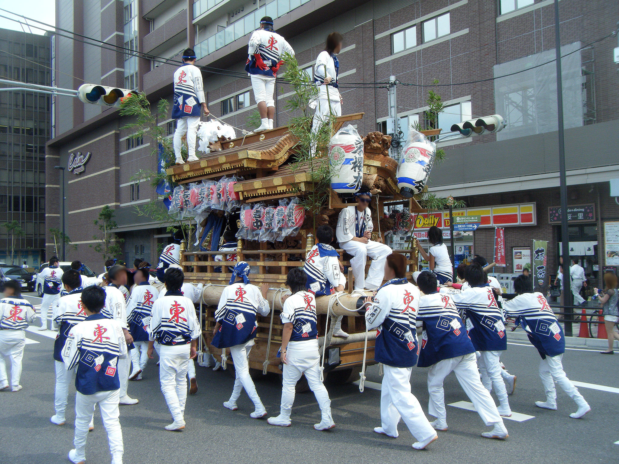 尼崎・貴布禰神社 だんじり祭宵宮